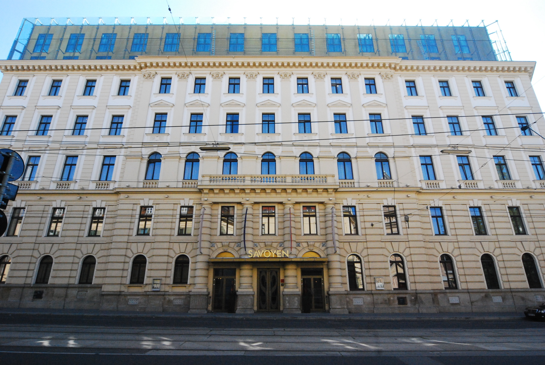 Haus Rennweg 16 in Wien-Landstraße, ehemalige Staatsdruckerei, jetzt Austria Trend Hotel Savoyen (Neubau hinter erhalten gebliebener Fassade)